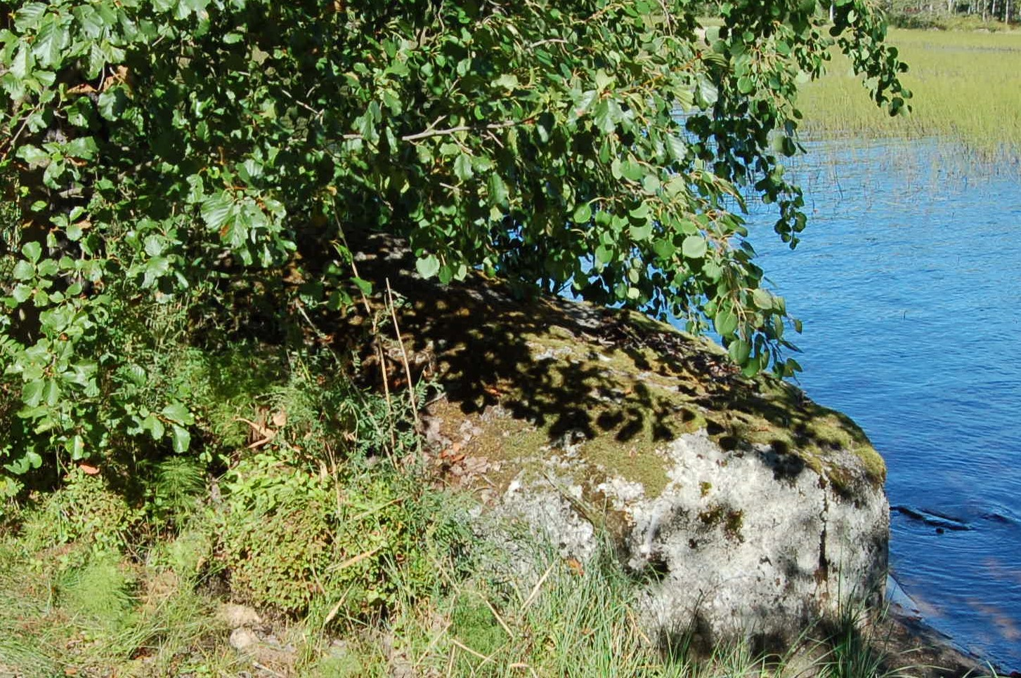 Iiroonkivi. Esim. vuoden 1740 rajankäyntiasiakirjassa on käytetty myös nimeä Koppello Kifvi, (Koppelokivi)